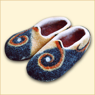 Handgefertigte Filzschuhe